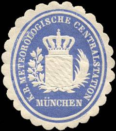 Sealing stamp Title: Königlich Bayerische Meteorologische Centralstation - München Description: blau, weiß, geprägt Place: München size: 4x4 cm